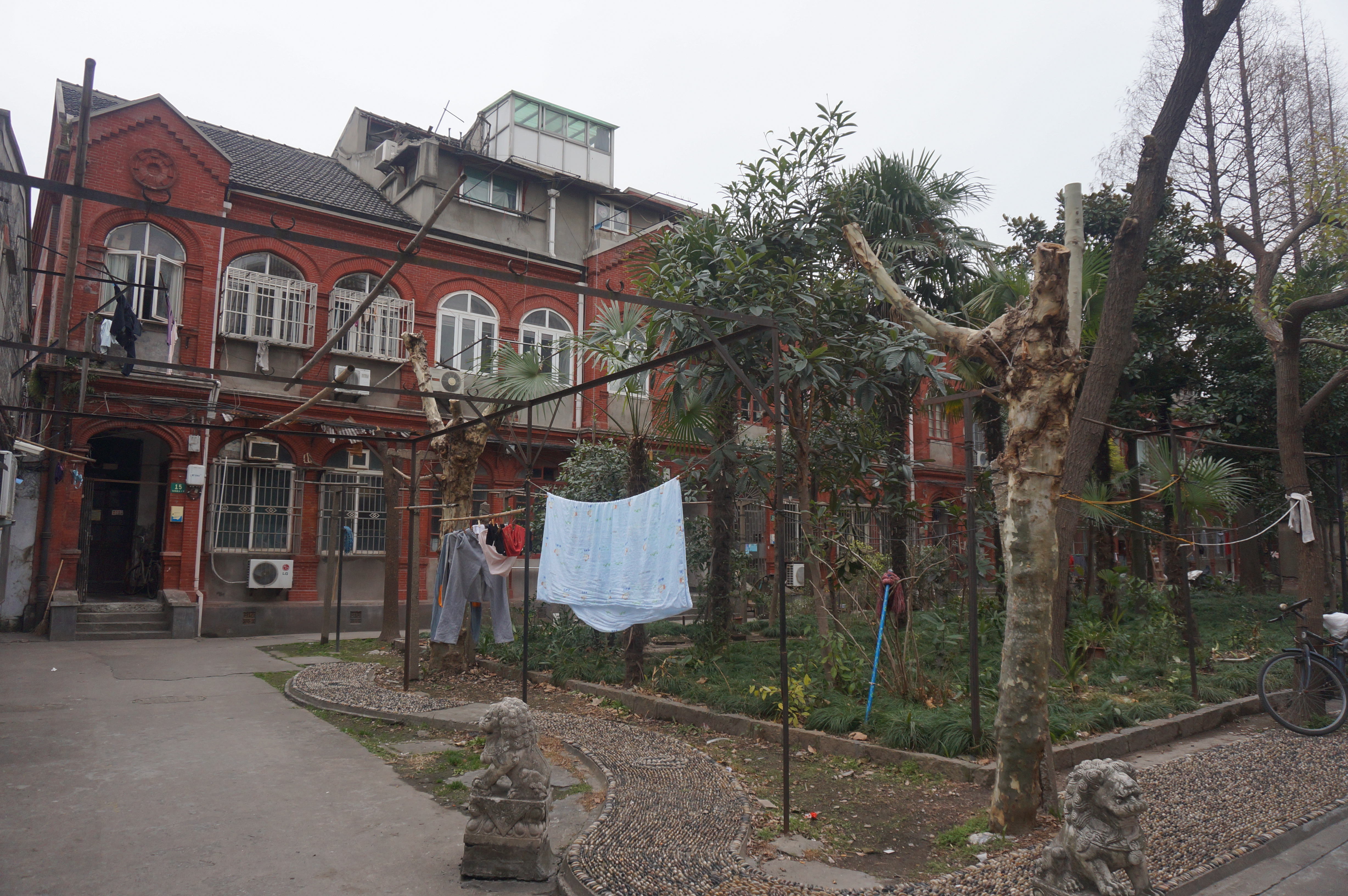 上海长阳路50弄15-31号